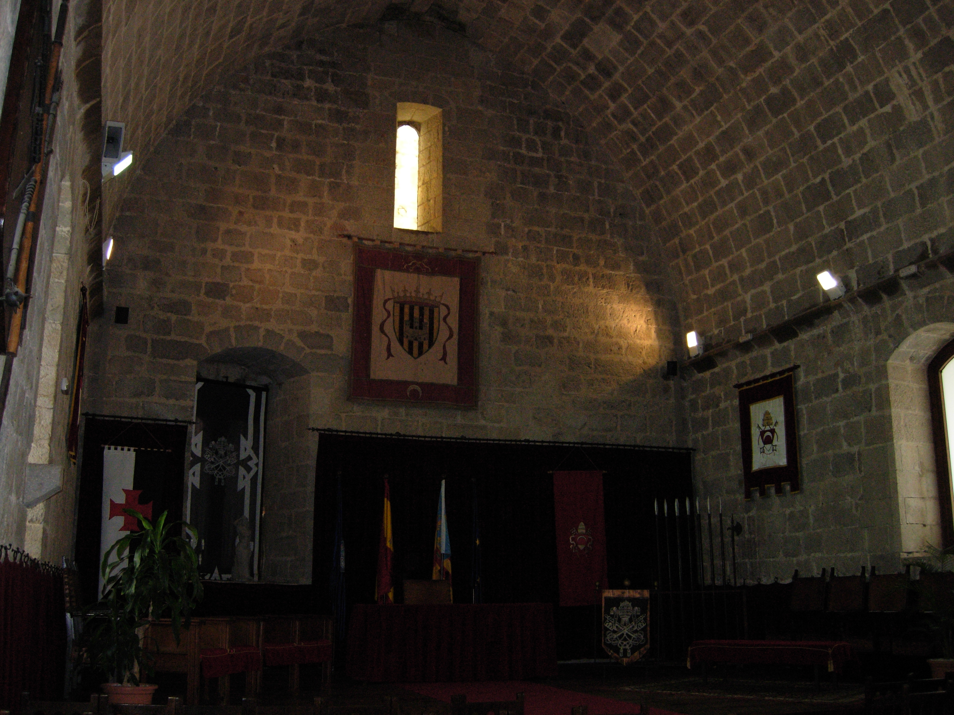 Peñiscola - sala del Comanador.